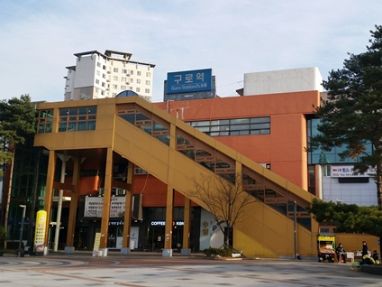 북광장쪽에서 촬영한 구로역 역사